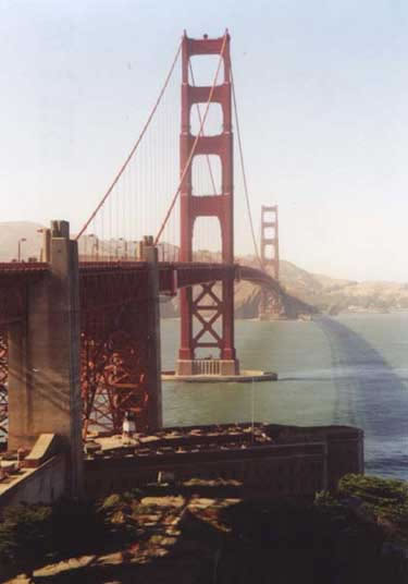 Die Golden Gate Bridge in San Francisco.